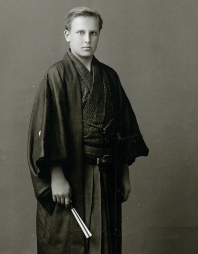 Taro Gadelius, född 27 augusti 1913 i Tokyo, död 30 juli 1995